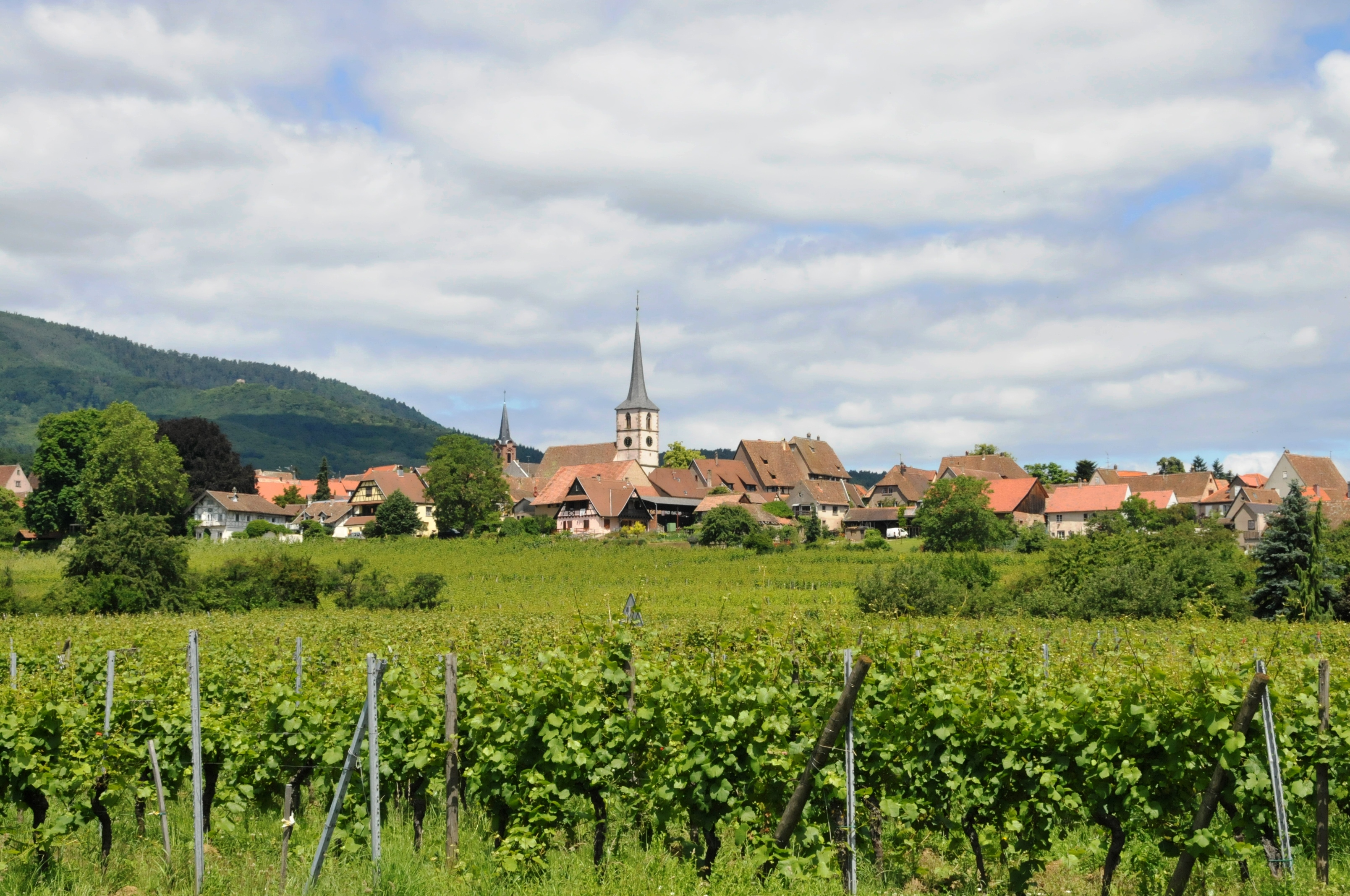 Mittelbergheim